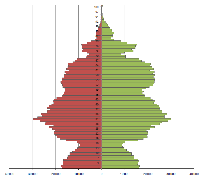 Вікова піраміда населення Києва у 2014 р. / Population pyramid of Kyiv in 2014